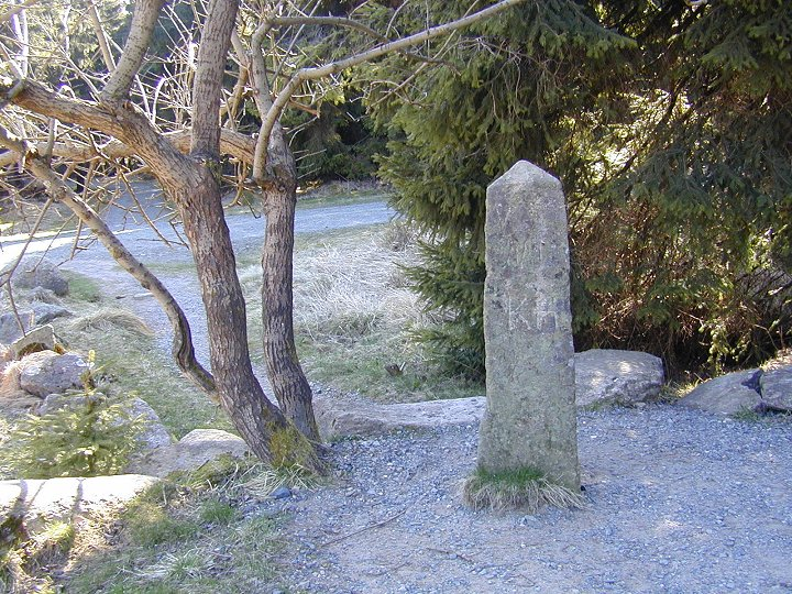 Grenzstein "Dreieckiger Pfahl" im Nationalpark Harz, heutige Grenze zwischen Sachsen-Anhalt und Niedersachsen, Inschrift „N 1“ für Nr. 1 und und „KH“ für Königreich Hannover